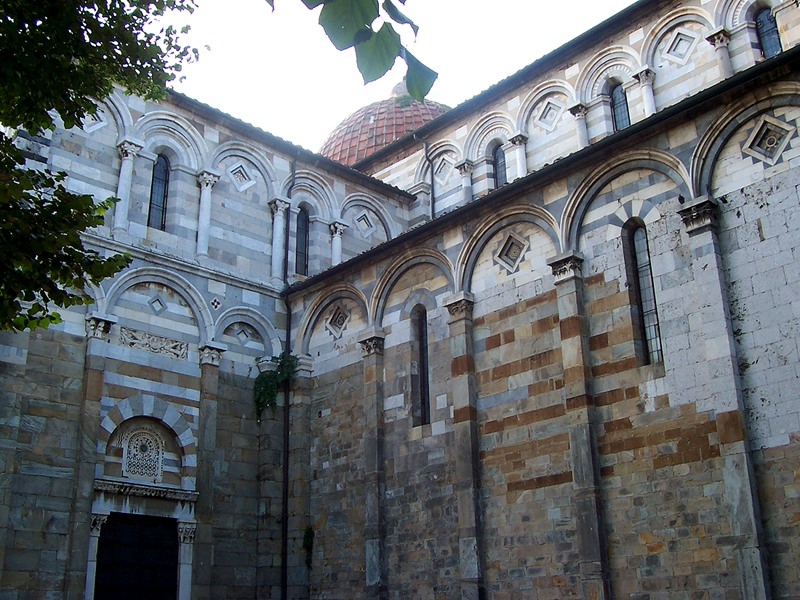 Pisa - Chiesa di S. Paolo a Ripa d'Arno